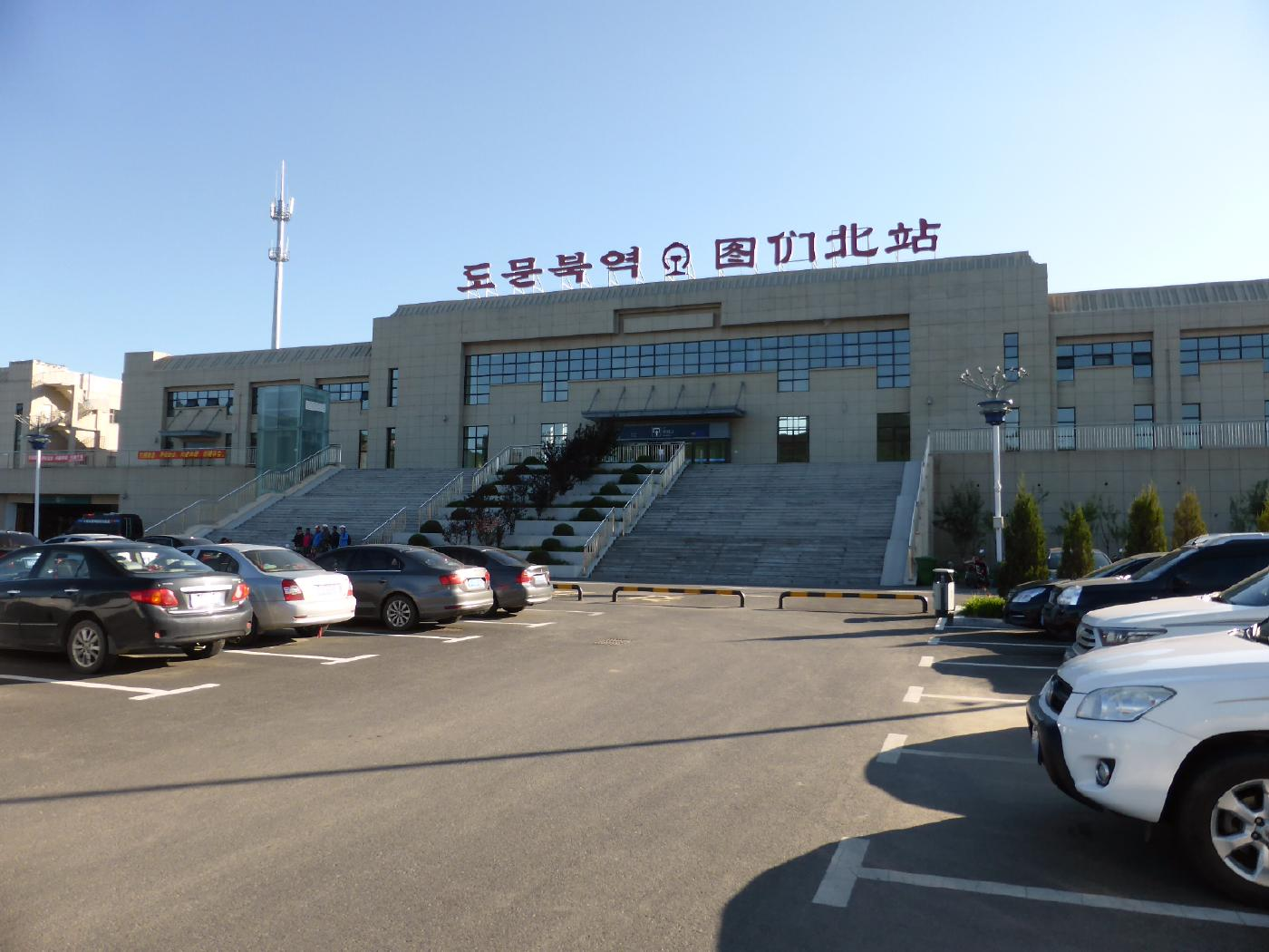 図們北駅全景